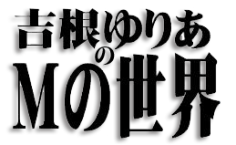 吉根ゆりあのMの世界